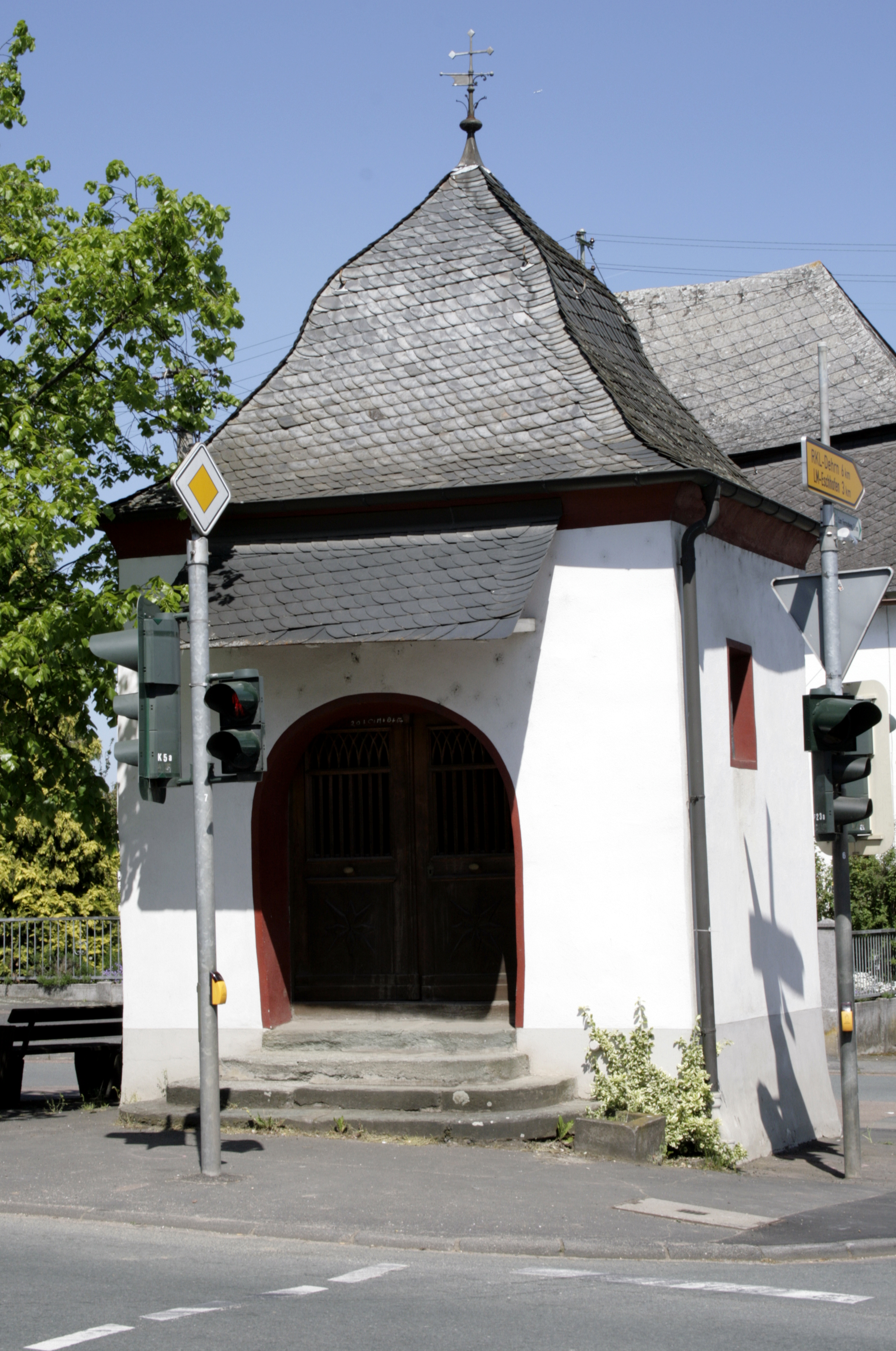 Wendelinuskapelle in Lindenholzhausen, Deutschland